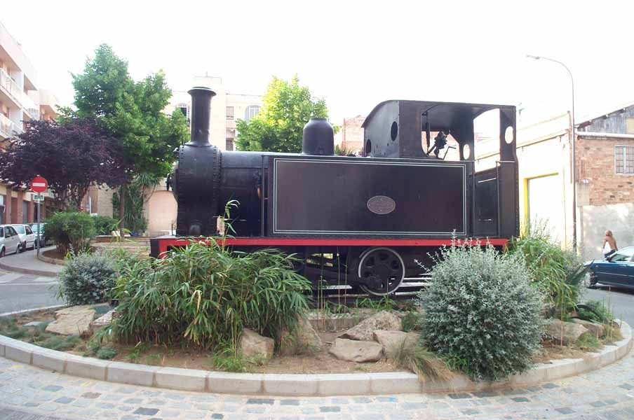 Carrilet, monumento al Carrilet de Reus